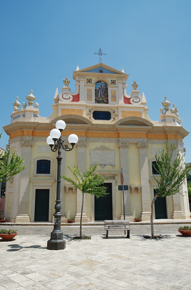 Description= La chiesa fu costruita nel 1455 e fu dedicata a San Quintino, che gli Allistini avevano da poco scelto come loro santo patrono, ritenendo di esser stati liberati per sua intercessione dal pericolo della peste. Source= own work. Date= 2006. Author= Antonio47